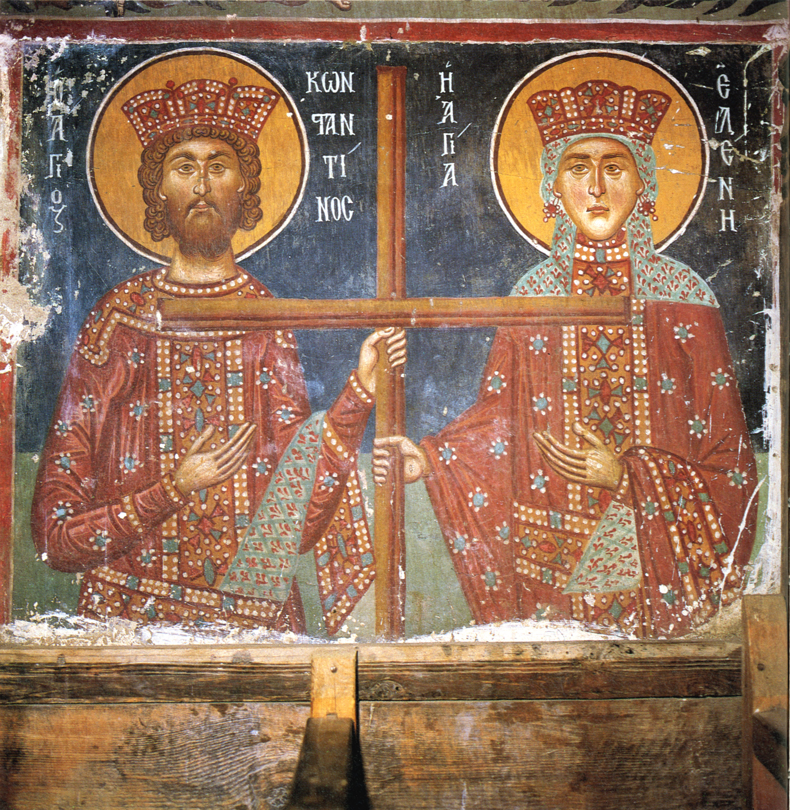 KAiser Konstantin und seine Mutter Helena. Fresko in Pedoulas